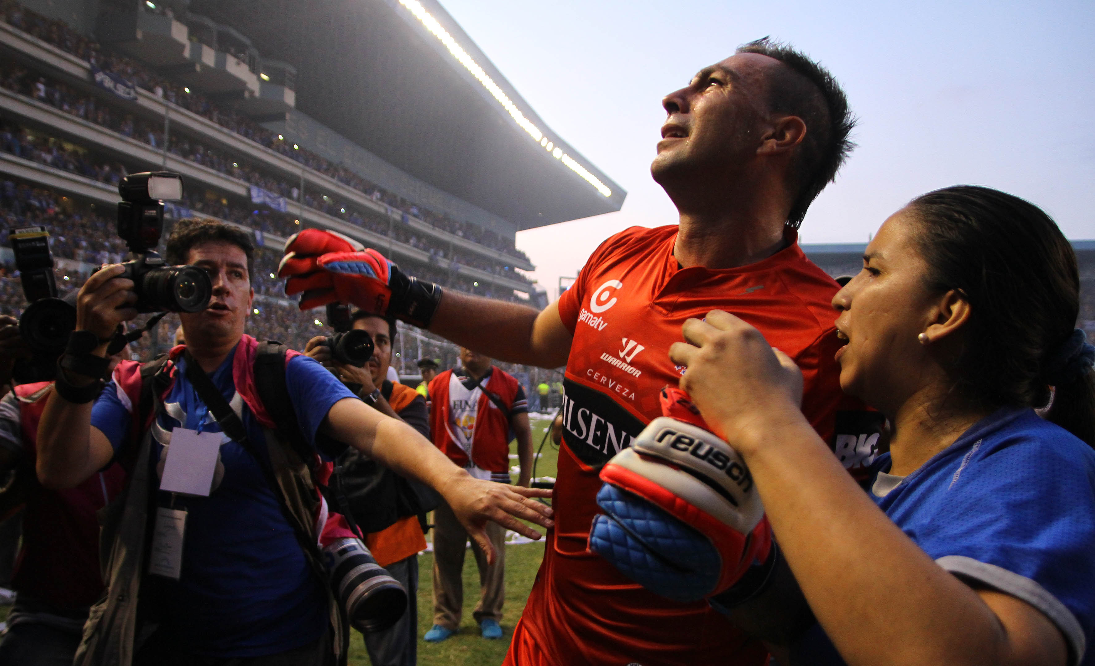 Guayaquil, Ecuador, 21 de diciembre del 2014 (ANDES).-Esteban Dreer festeja el campeonato de Emelec, luego de ganar 3x0 a Barcelona Foto:César Muñoz/ANDES